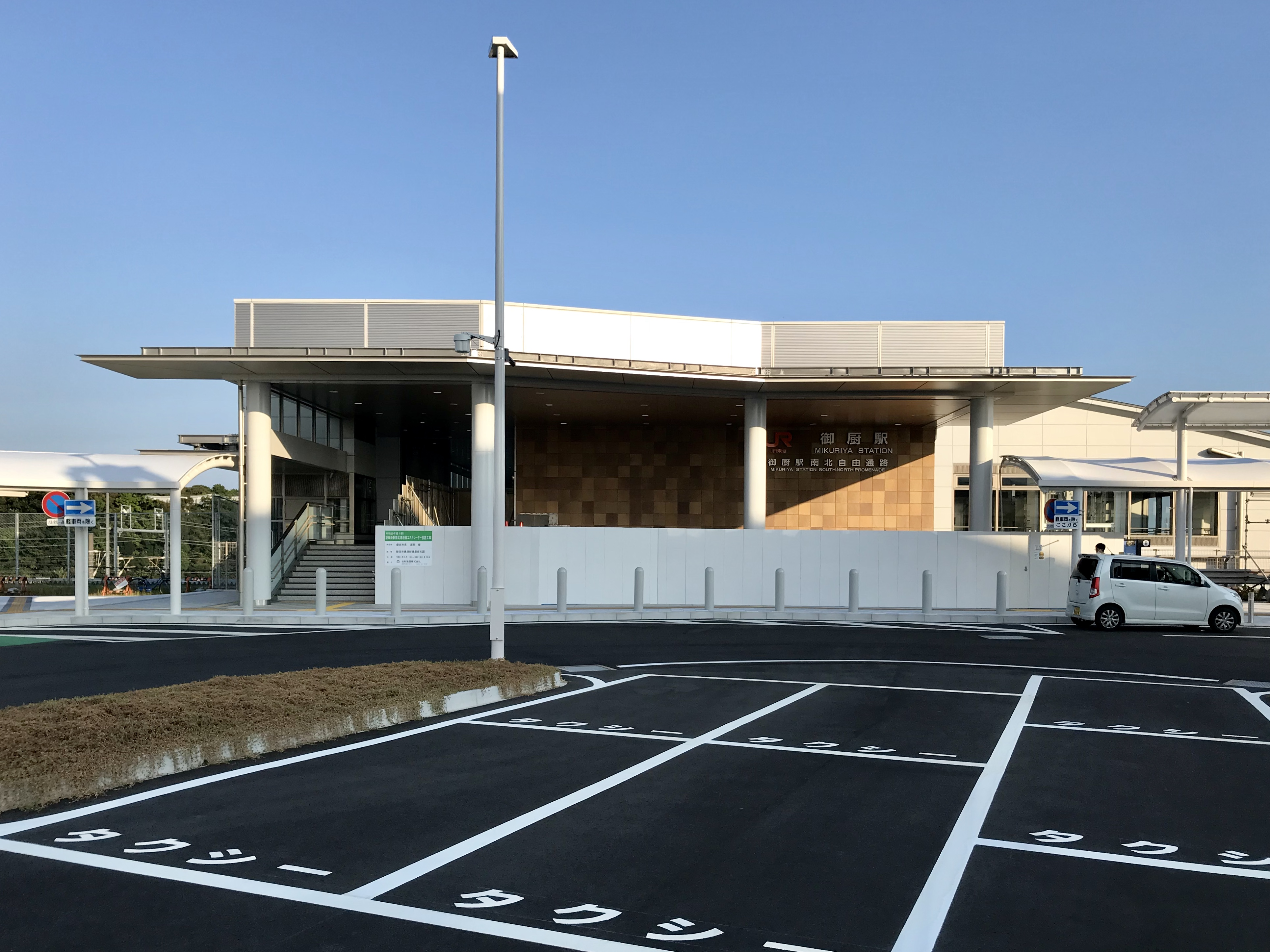 JR東海東海道本線御厨駅北口